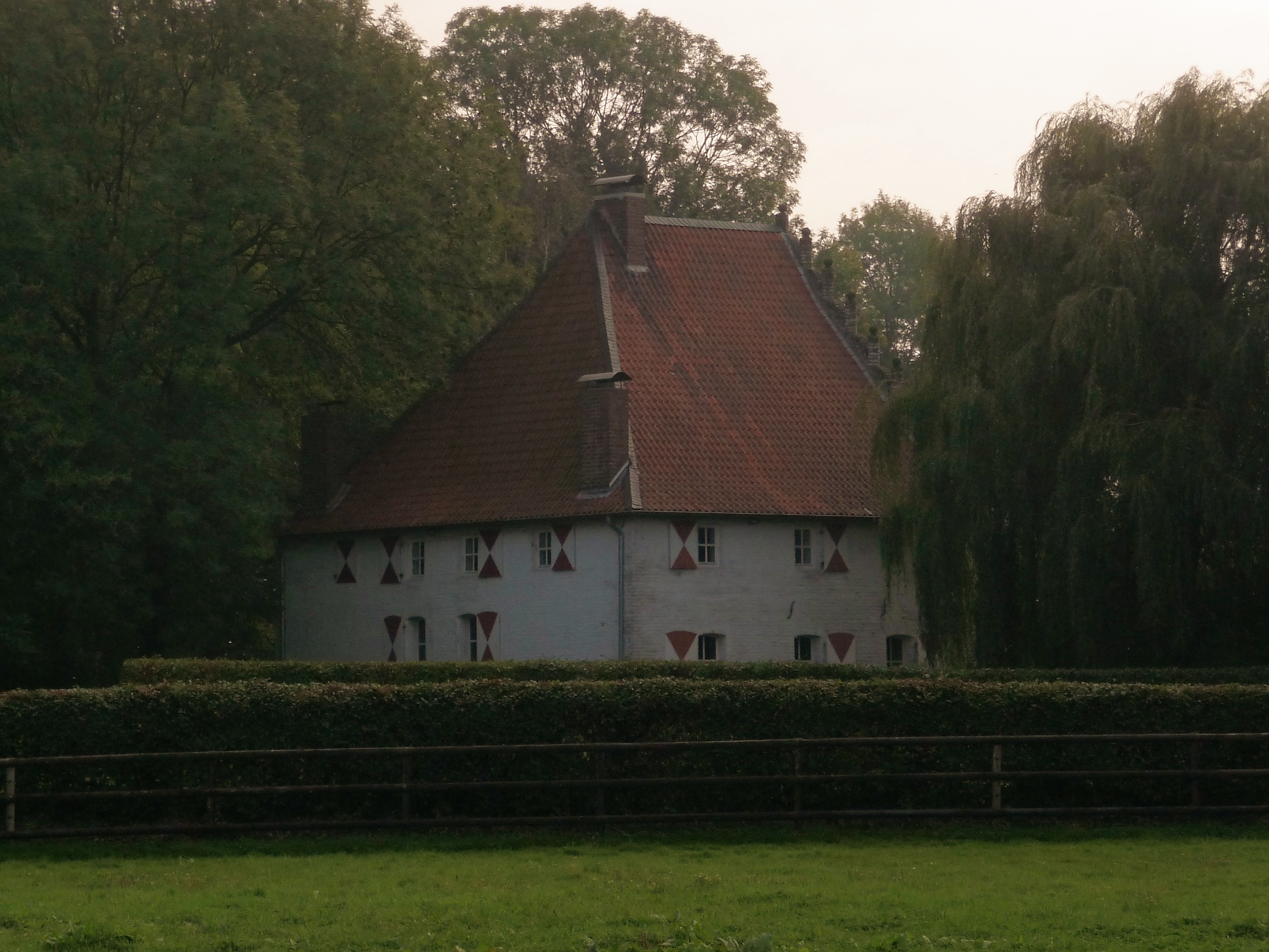 Denkmalliste Nr. 27, "Berfes Gelleshof" und Grabenanlage, Tönisvorst, Kehn 65